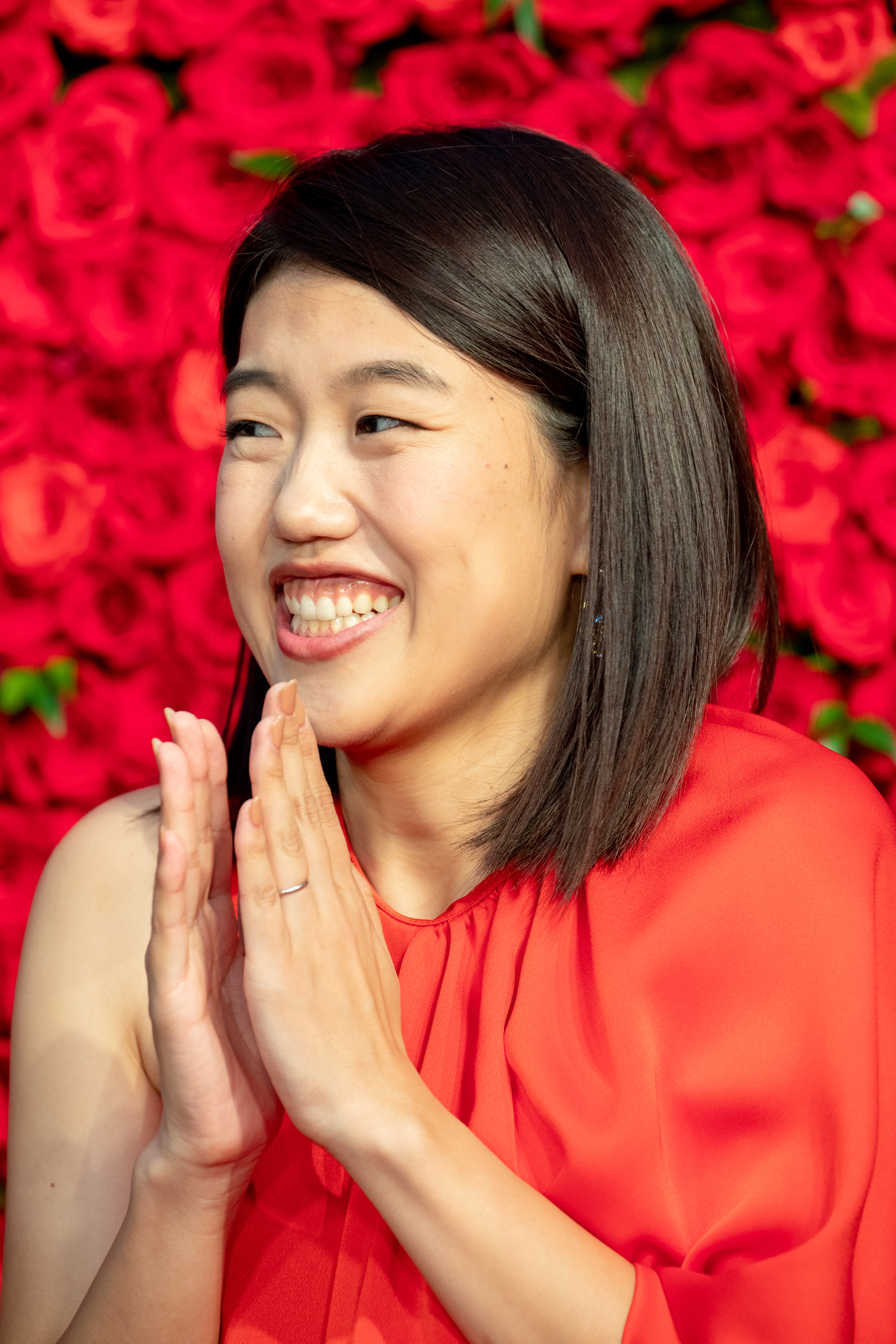 第30回 東京国際映画祭 オープニングセレモニー 横澤夏子 (えちてつ物語～わたし、故郷に帰ってきました。～)